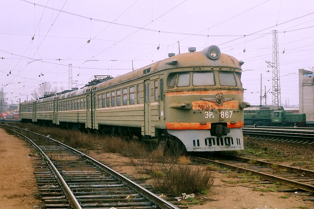 Электропоезд ЭР2в-867/868 недалеко от Финляндского вокзала (Санкт-Петербург)